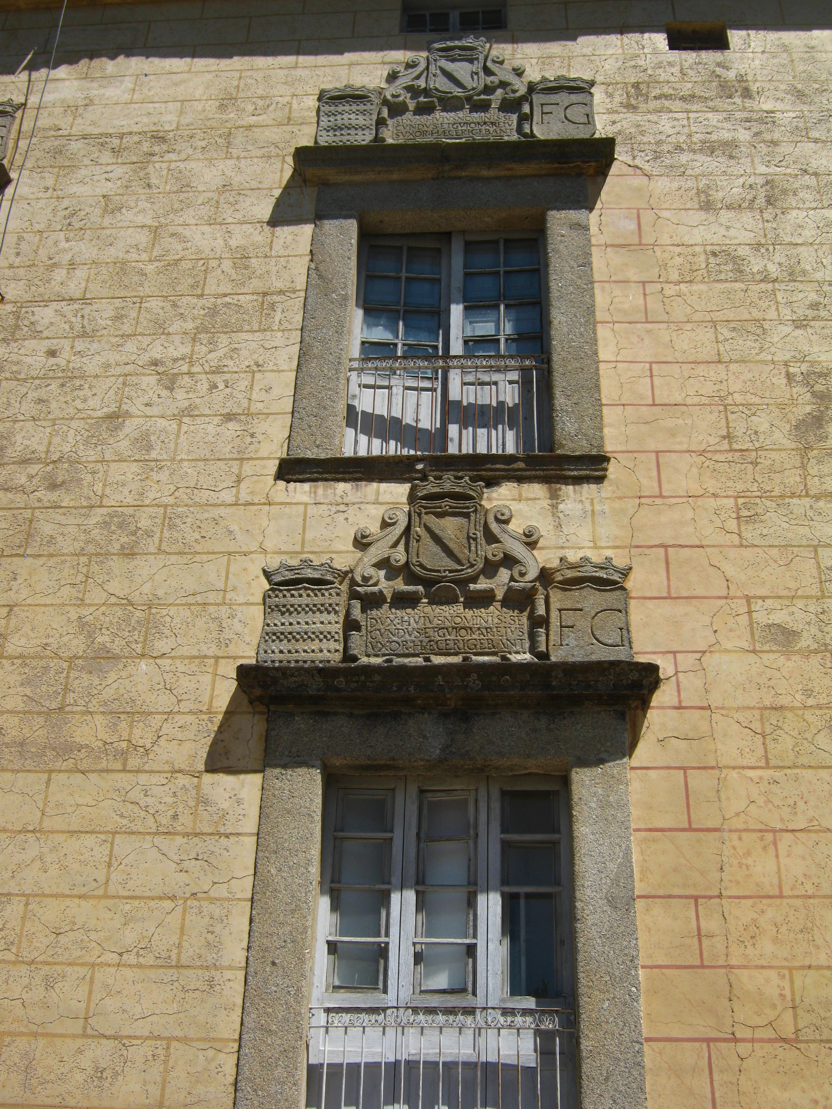 Escudos de los Zúñiga (Duques de Béjar) en el palacio que poseían en El Bosque (Béjar)